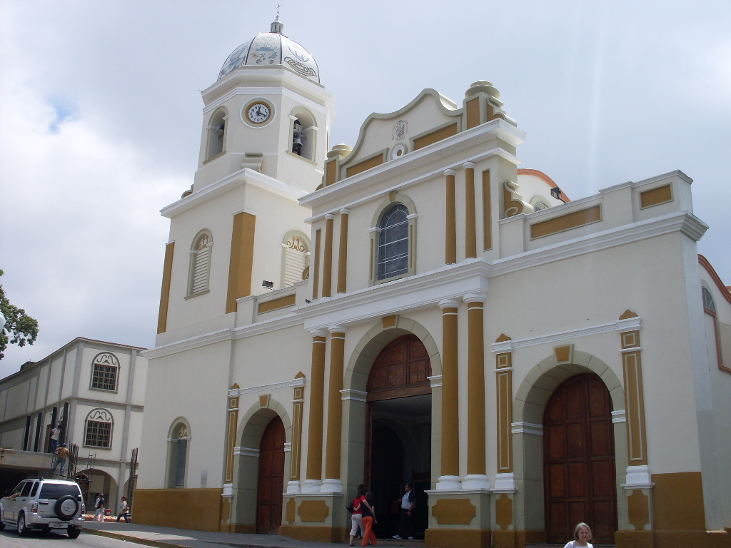 Santa Rosa Barquisimeto, estado Lara - Venezuela